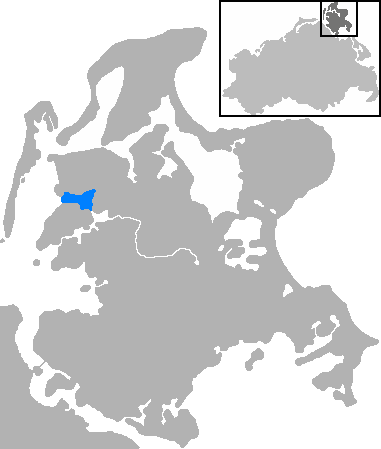 Mecklenburg-Vorpommern, Udarser Wiek Bay, near Schaprode (marked blue)